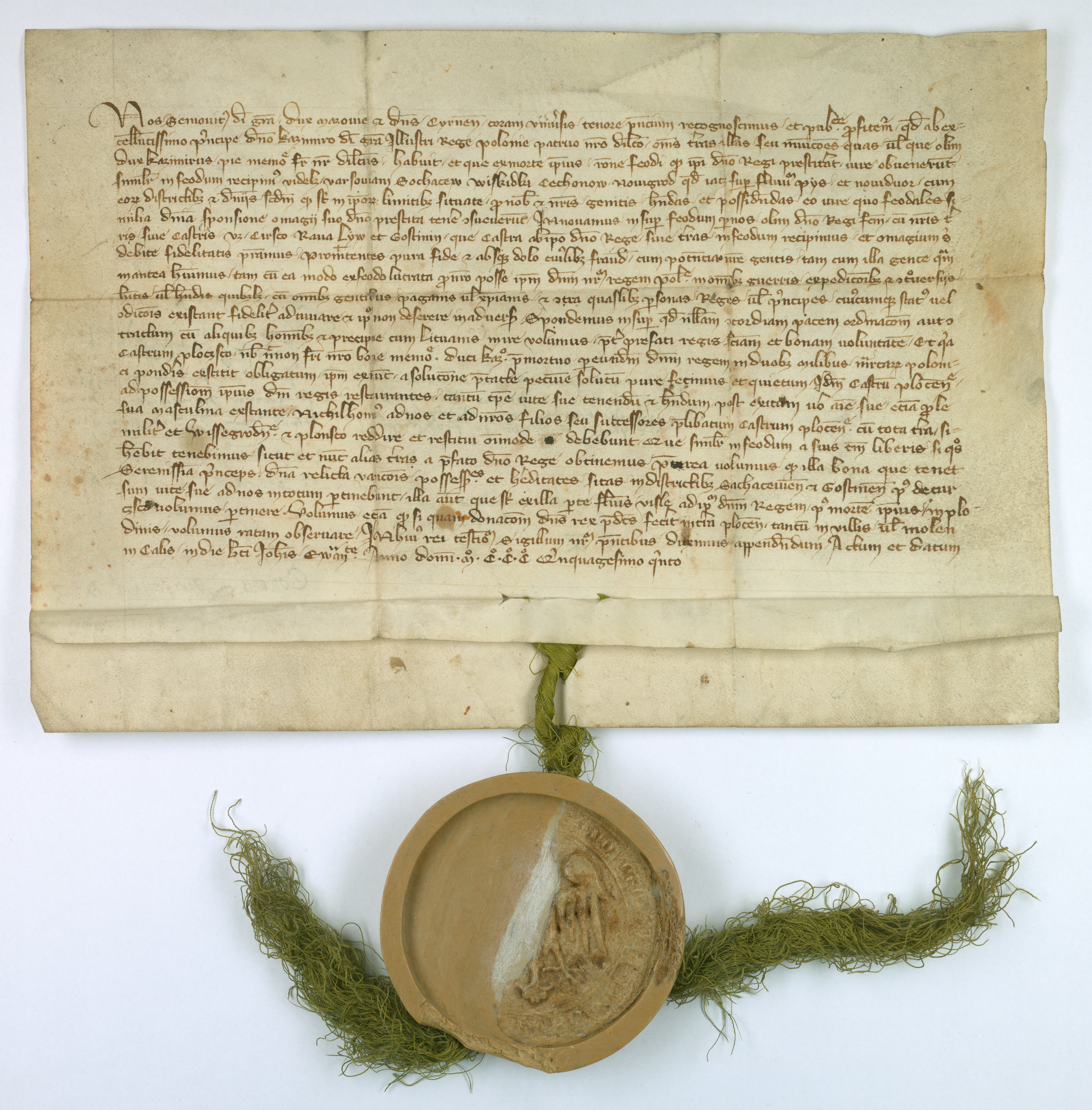 Siemowit III, książę mazowiecki i pan czerski, stwierdza, że otrzymał w lenno od króla Polski Kazimierza Wielkiego Warszawę, Sochaczew, Wiskitki, Ciechanów, Nowogród i Nowy Dwór wraz z okręgami. Odnawia królowi hołd lenny z dawniej otrzymanych ziem i grodów: Czersk, Rawa, Liw i Gostynin i zwraca Płock, zastawiony za sumę 2000 grzywien, zwalniając króla od spłaty długu.